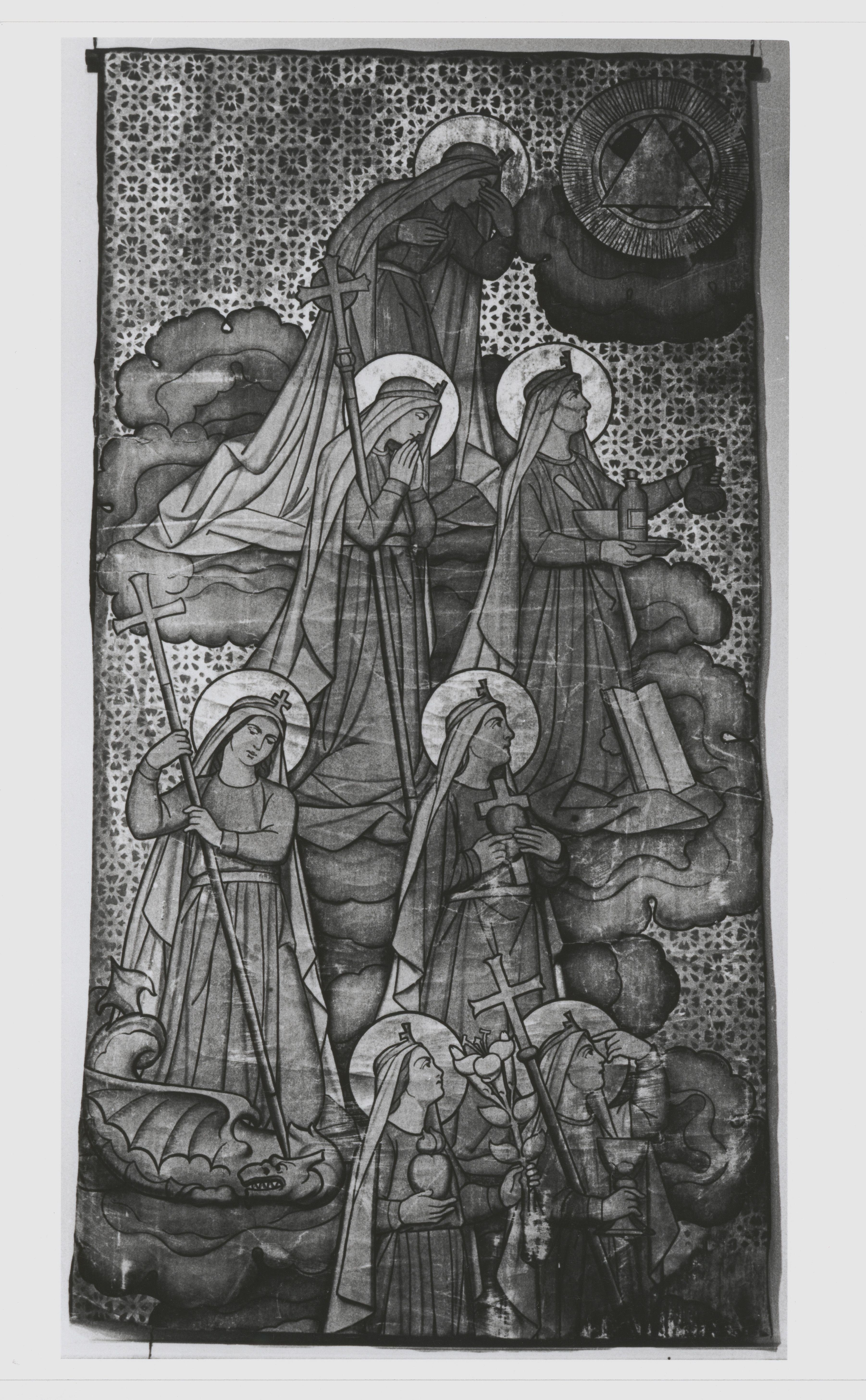 Bij de sloop van de Overdekte Zweminrichting (vml Mon Père Kerk) te voorschijn gekomen wandschildering op linnen van Van Winsen en Van de Wiel uit 1903, voorstellende "Jozef vervuld met de zeven gaven van de Heilige Geest". Zeven figuren met een aureool waarvan de meest linkse een draak in bedwang houdt met een speer voorzien van een kruis, Foto 1979.